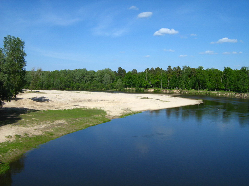 Река Илеть в Республике Марий Эл